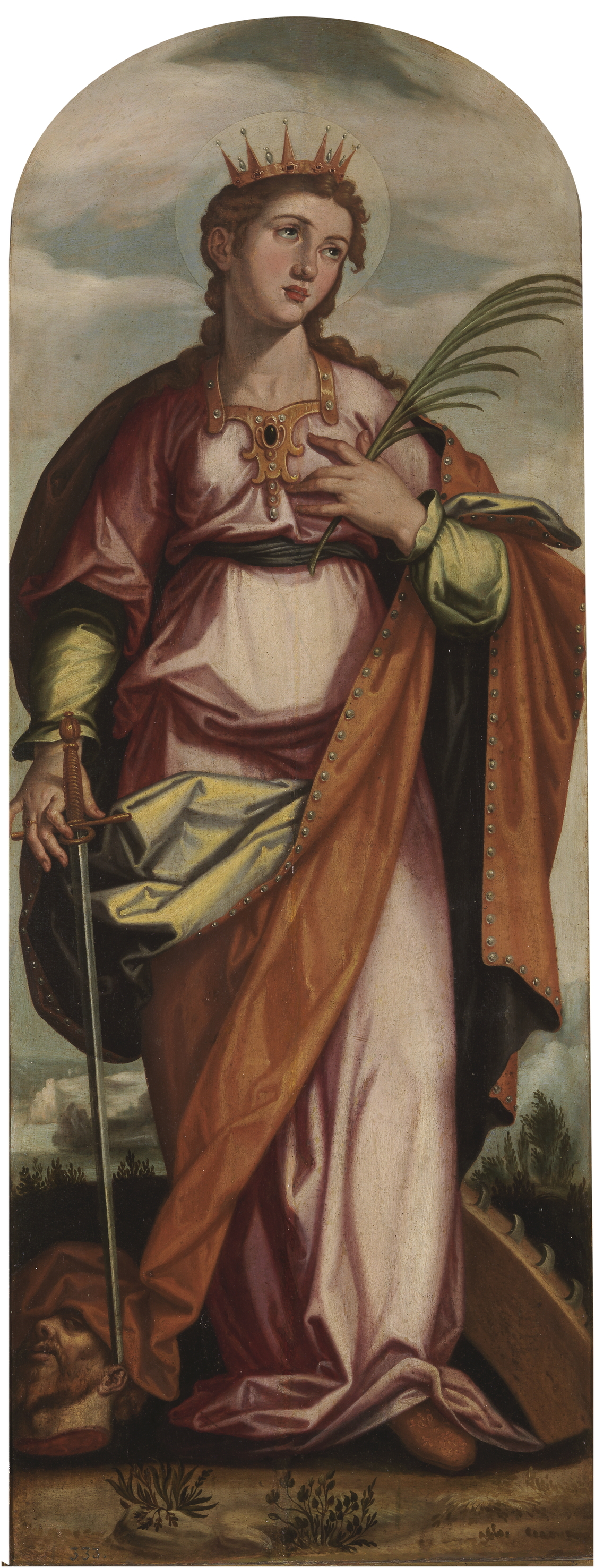 La obra representa a la virgen y mártir Santa Catalina de Alejandría, y es una de las cuatro obras de Francisco Pacheco que se conservan en el Museo del Prado. Y la santa aparece con los de la palma, la espada, la cabeza del moro y la rueda dentada, que frecuentemente la acompañan.